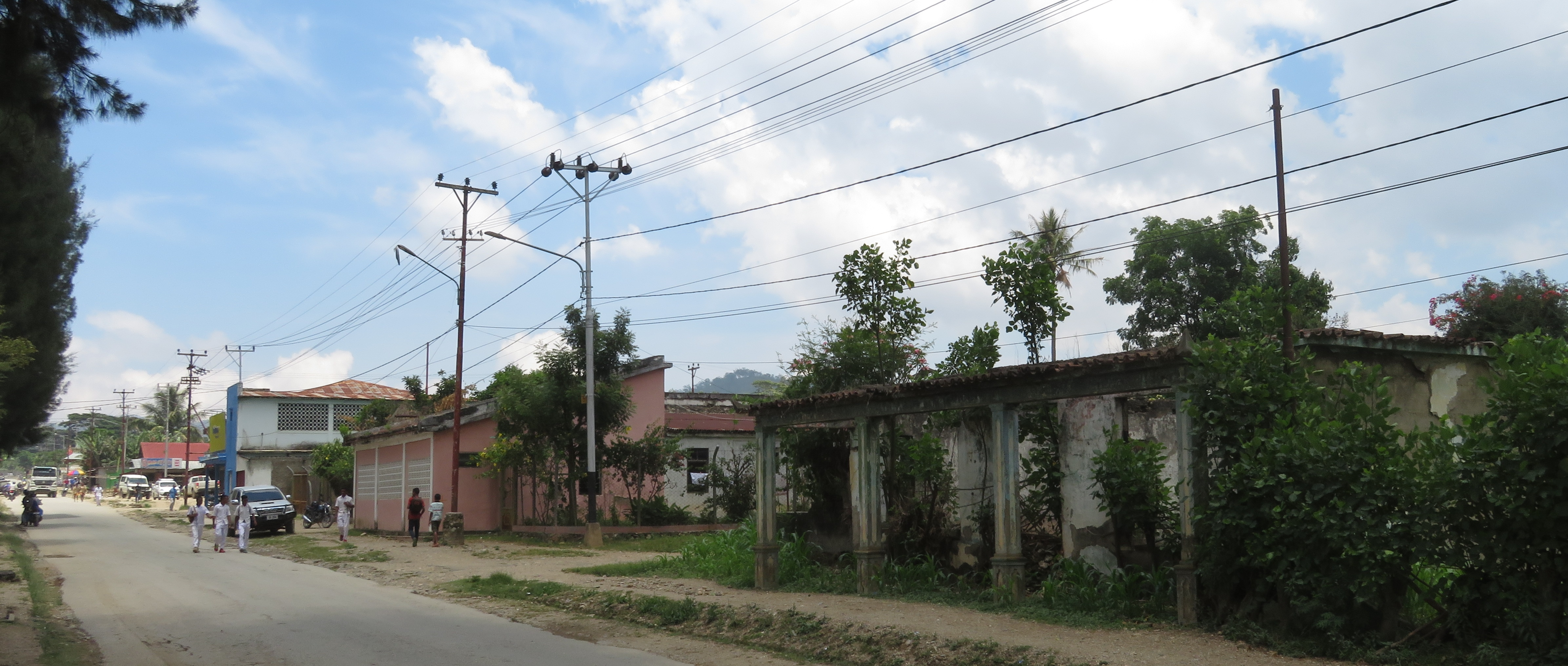 Hauptstraße, Aileu, Timor Leste